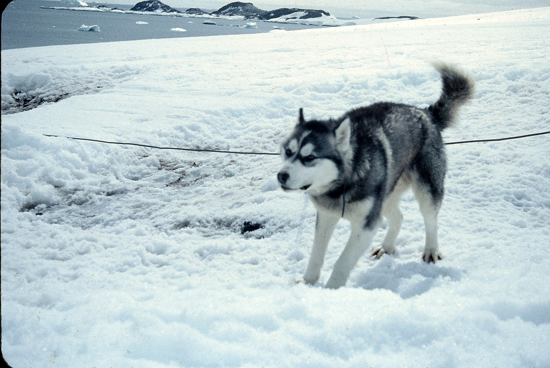 Perro antártico de la base O'Higgins del Ejército de Chile. Tierra de O'Higgins, rada Covadonga.